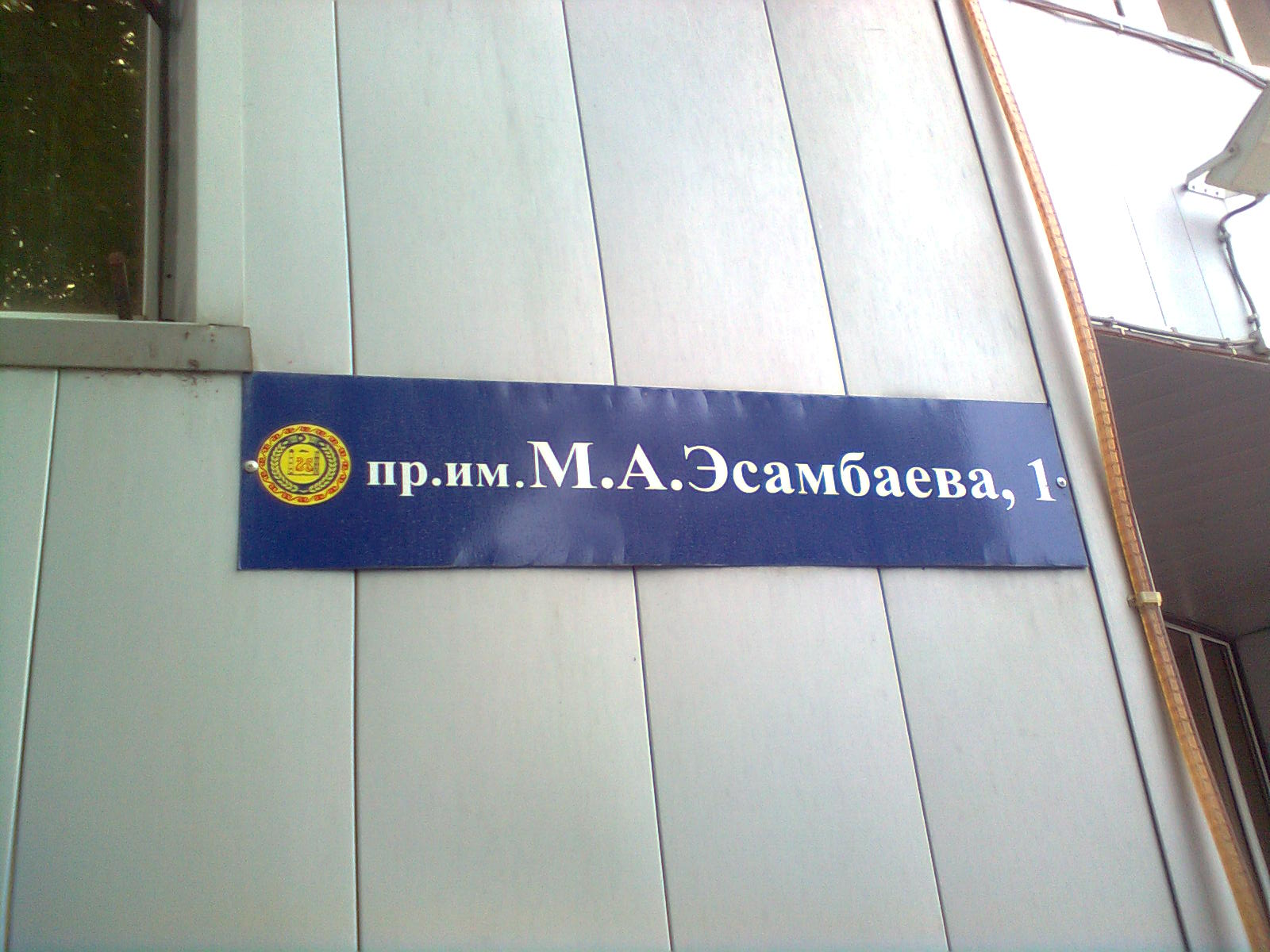 проспект Эсамбаева